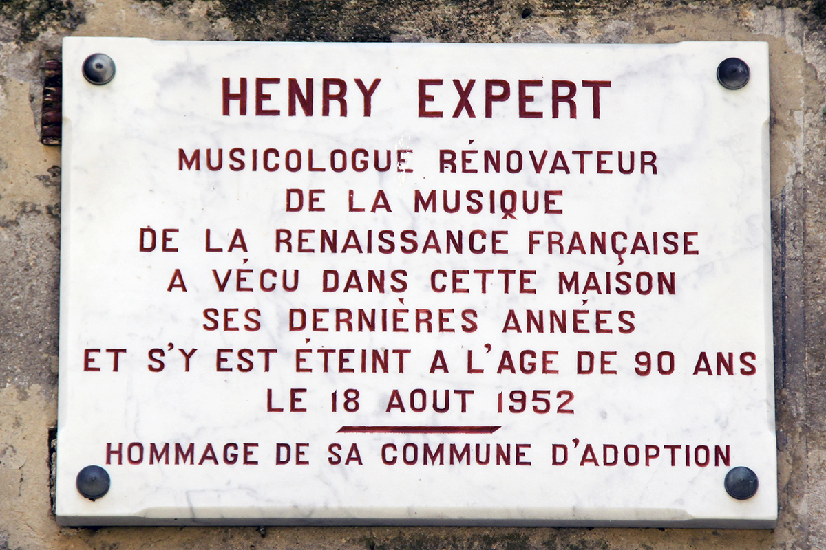 Placa a la façana de la casa on va viure i morir Henry Expert al poble de Tourrettes-sur-Loup (França)